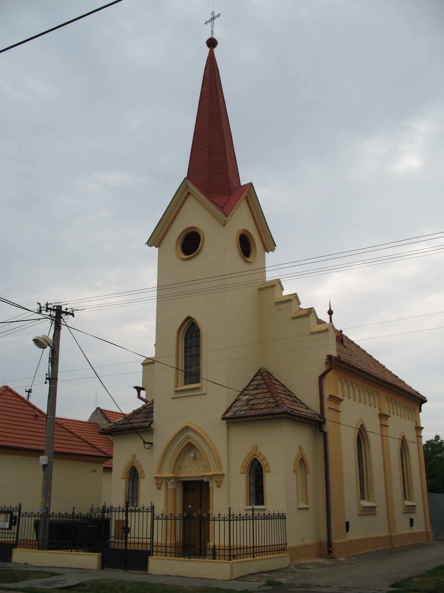 Kajal temploma